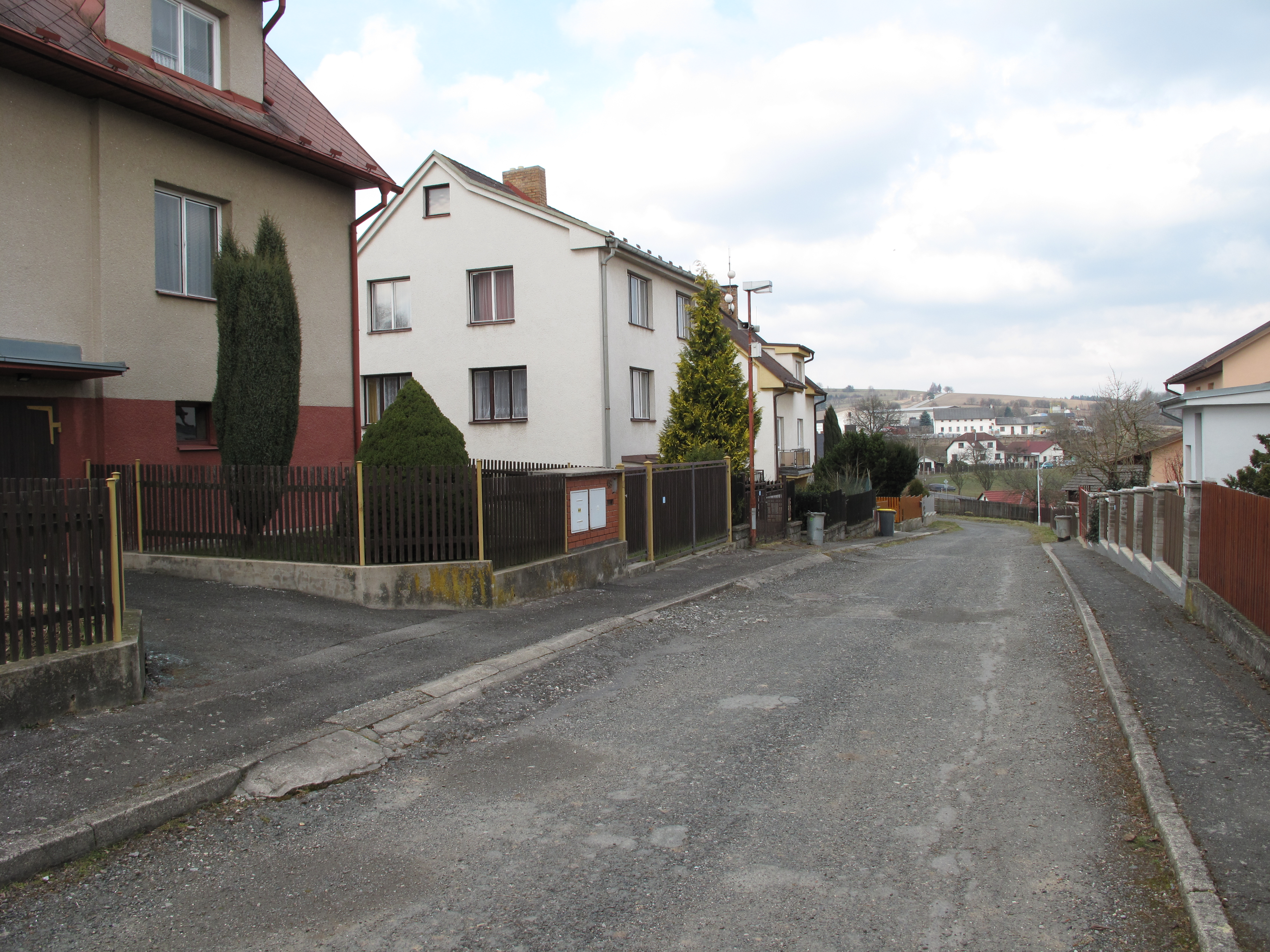 Ulice v Habreku. Okres Havlíčkův Brod, Česká republika.